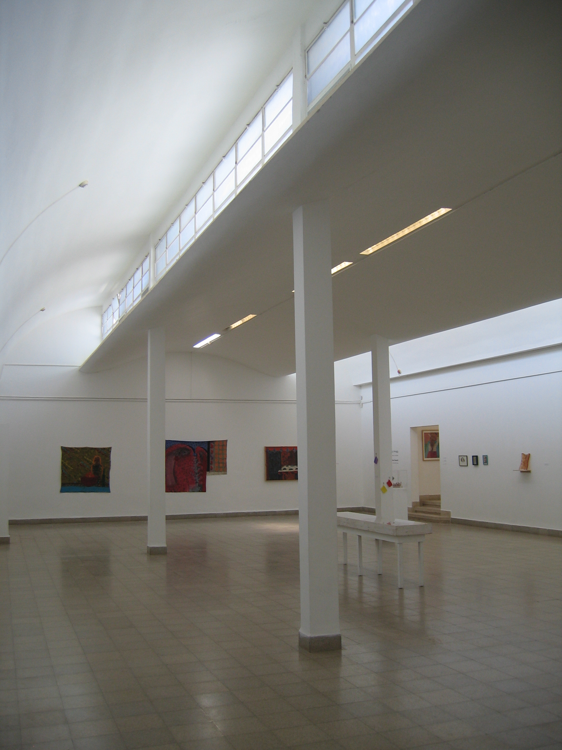 Museum of Art, Ein Harod